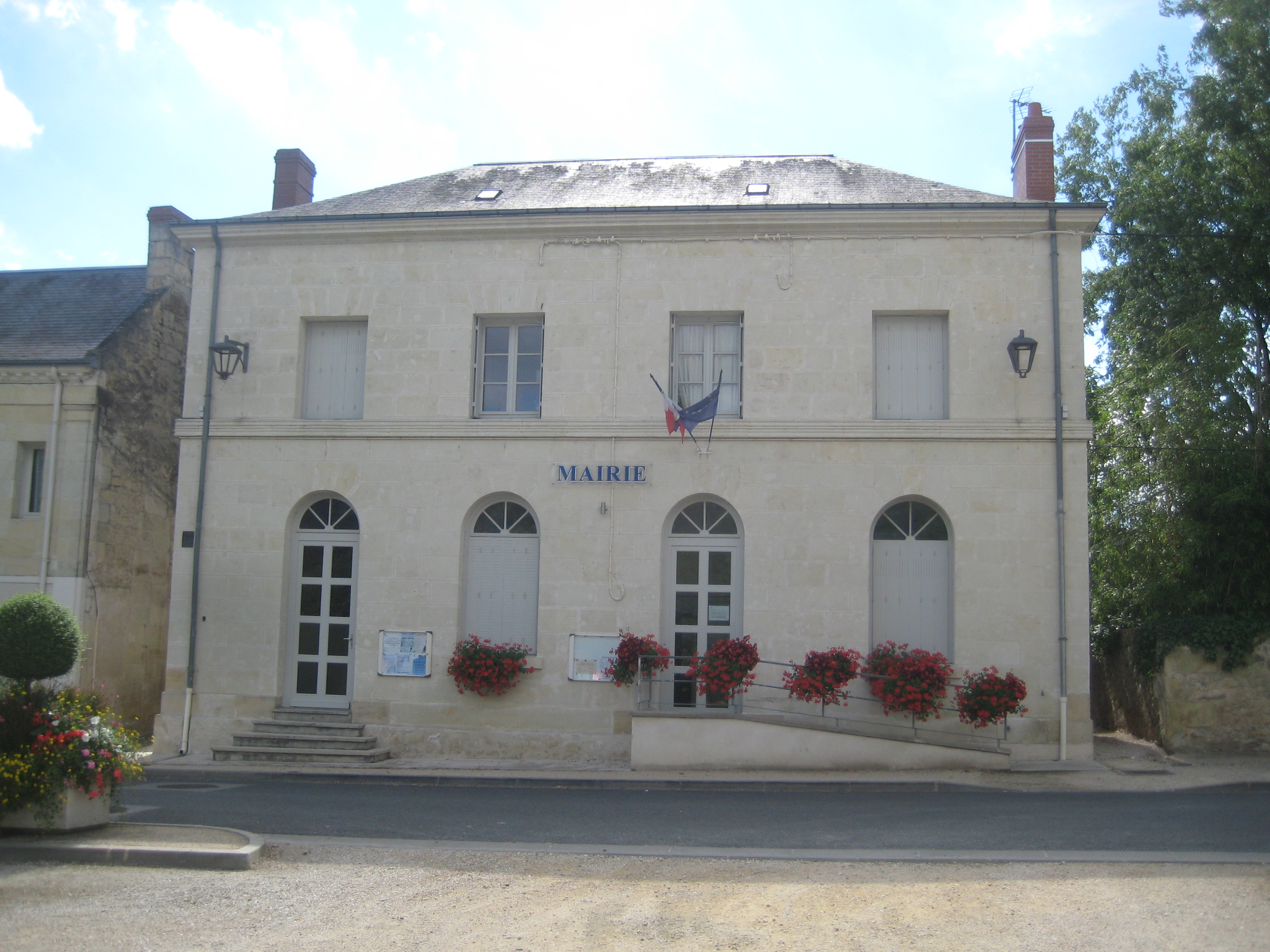 Mairie de La Chapelle-aux-Naux